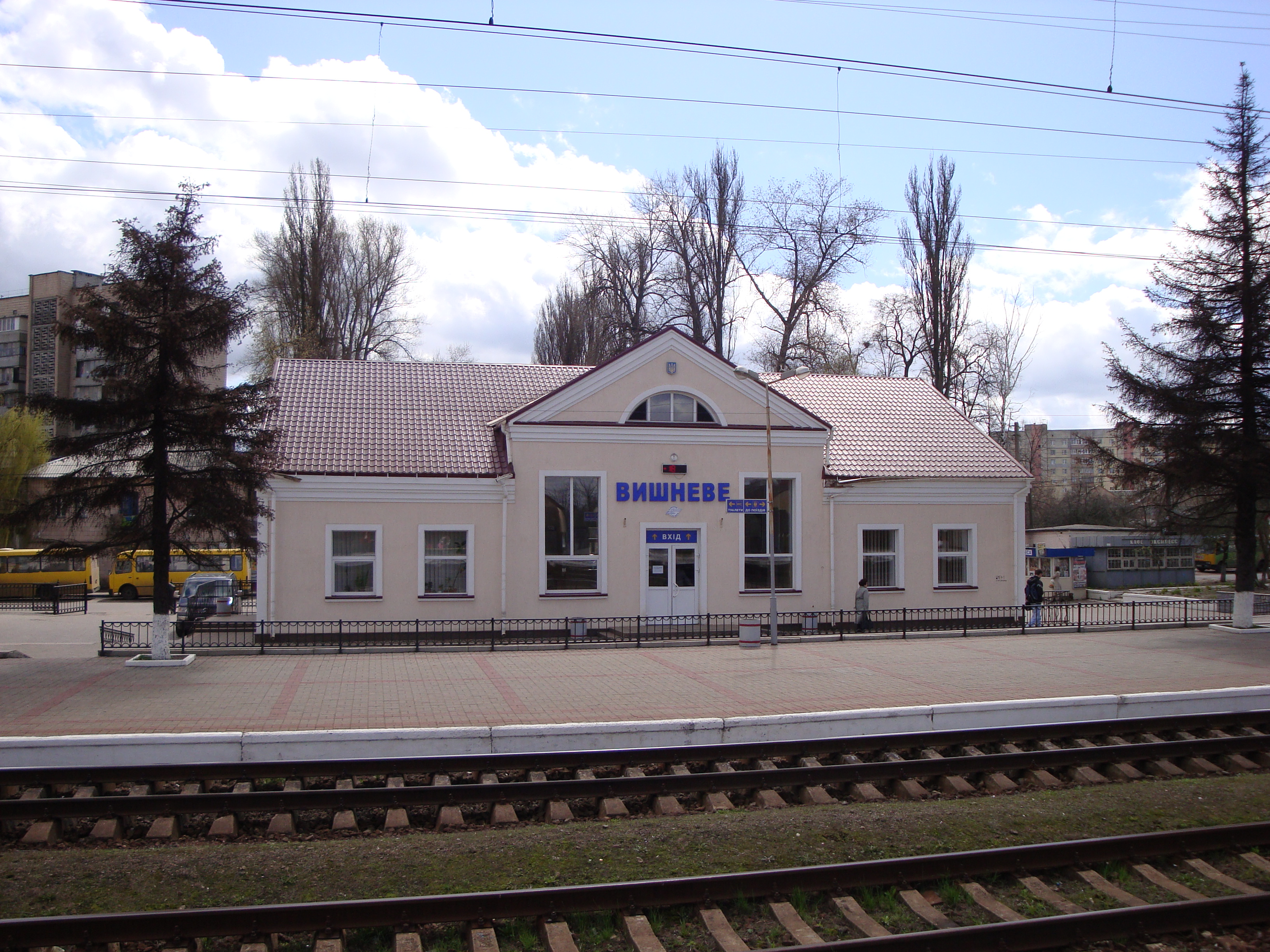 Залізничний вокзал станції Вишневе